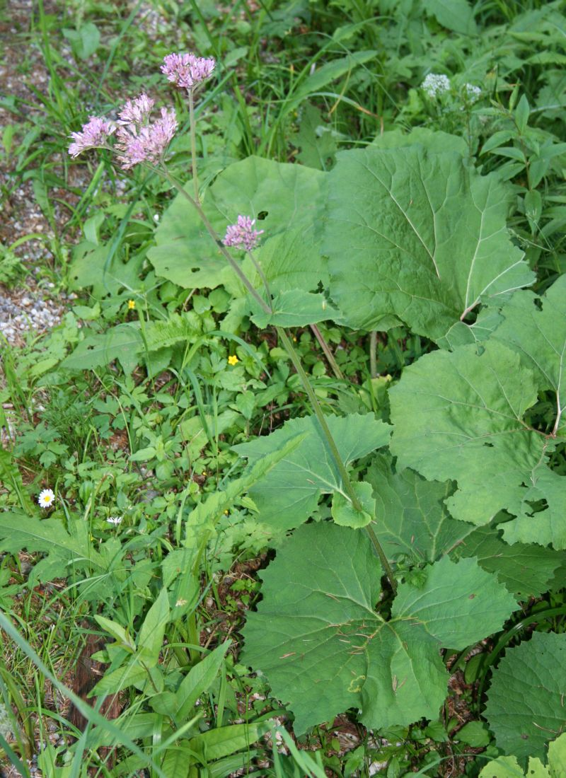 Grau-Alpendost (Adenostyles alliariae), Korbblütler (Asteraceae) - Österreich/Austria/Autriche: Oberösterreich, Hausruckviertel, ca. 2.2 km S Forsthaus Redltal, ca. 570 m s.m.